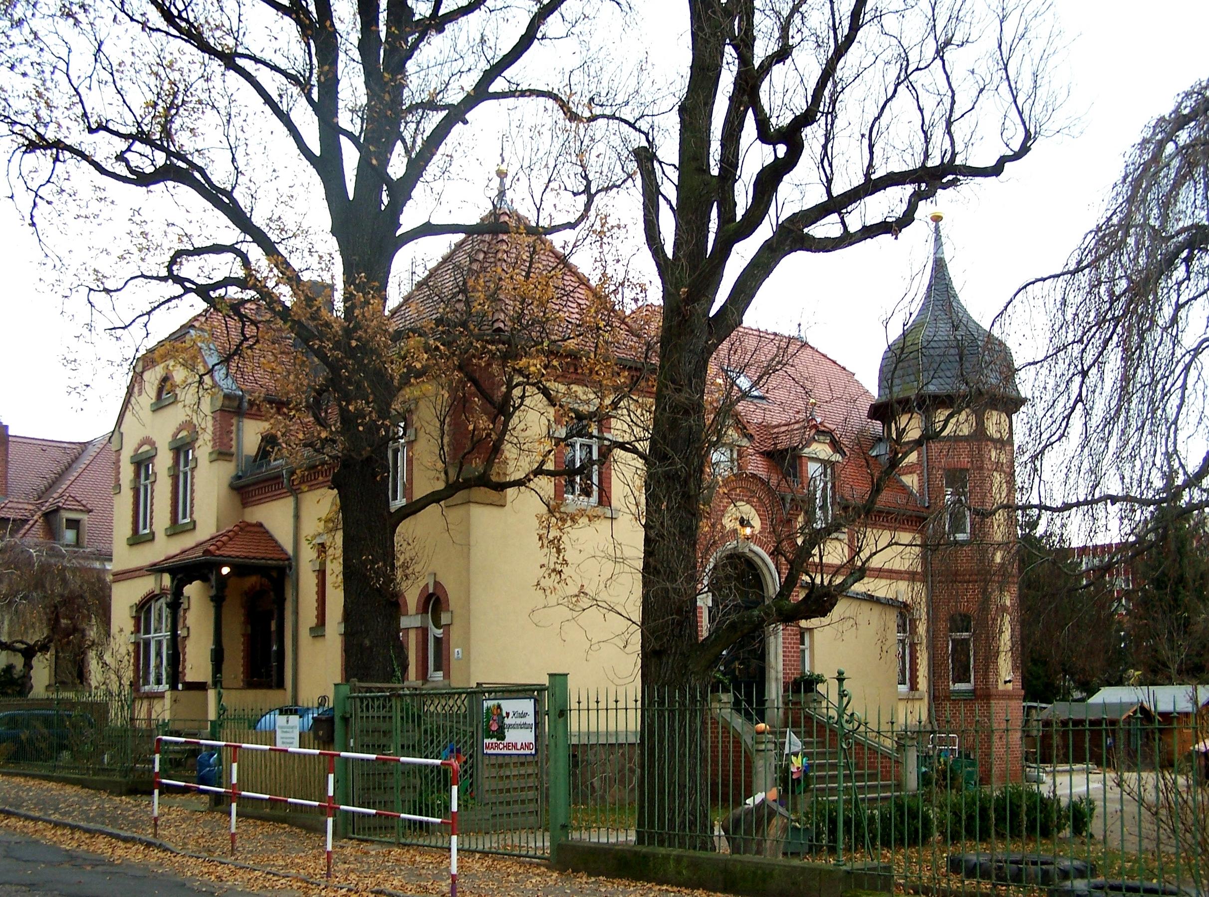 Villa Friedrich Hermann Clemens Fichtner (Marienstr. 5) in Radebeul